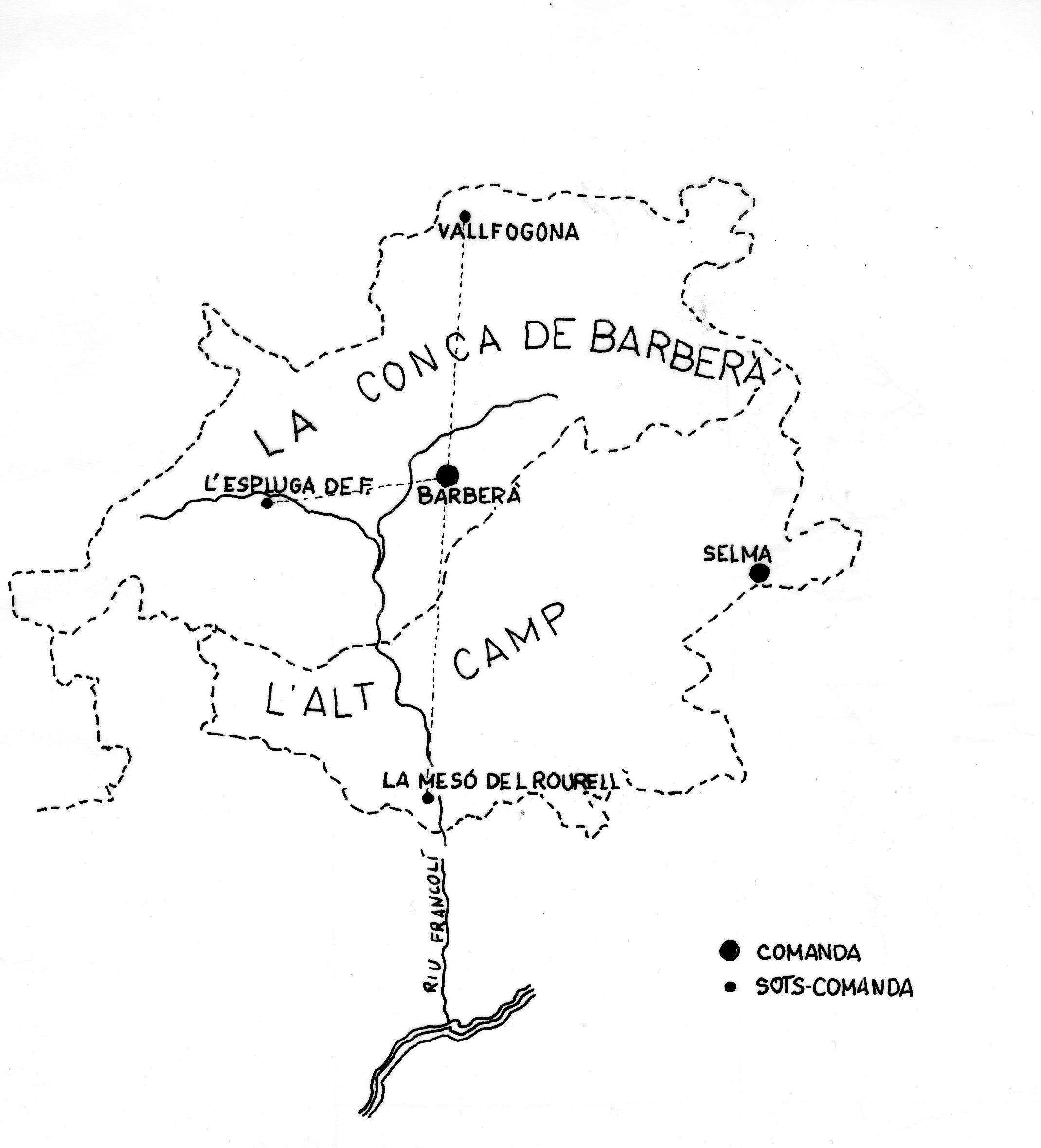 Mapa de la comanda templera de Barberà amb les seves dependències o sotscomandes. (Dib. J. Fuguet)